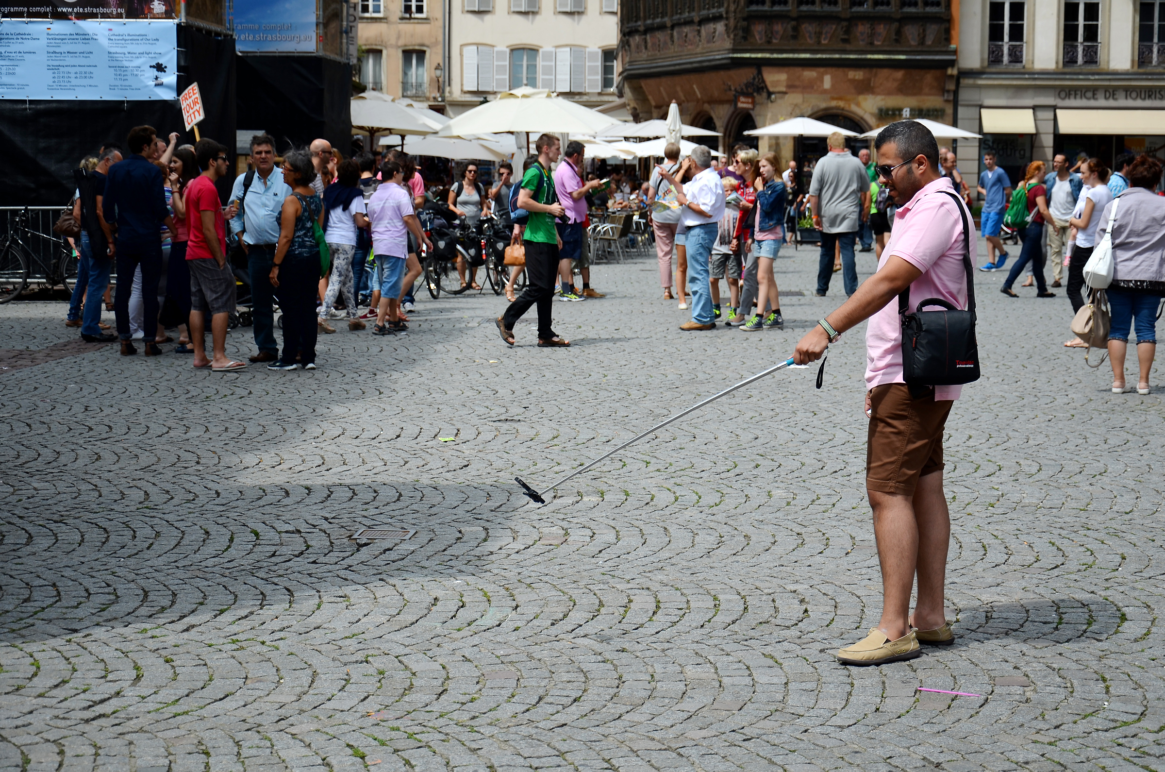 Straßburg, Selfie-Stange